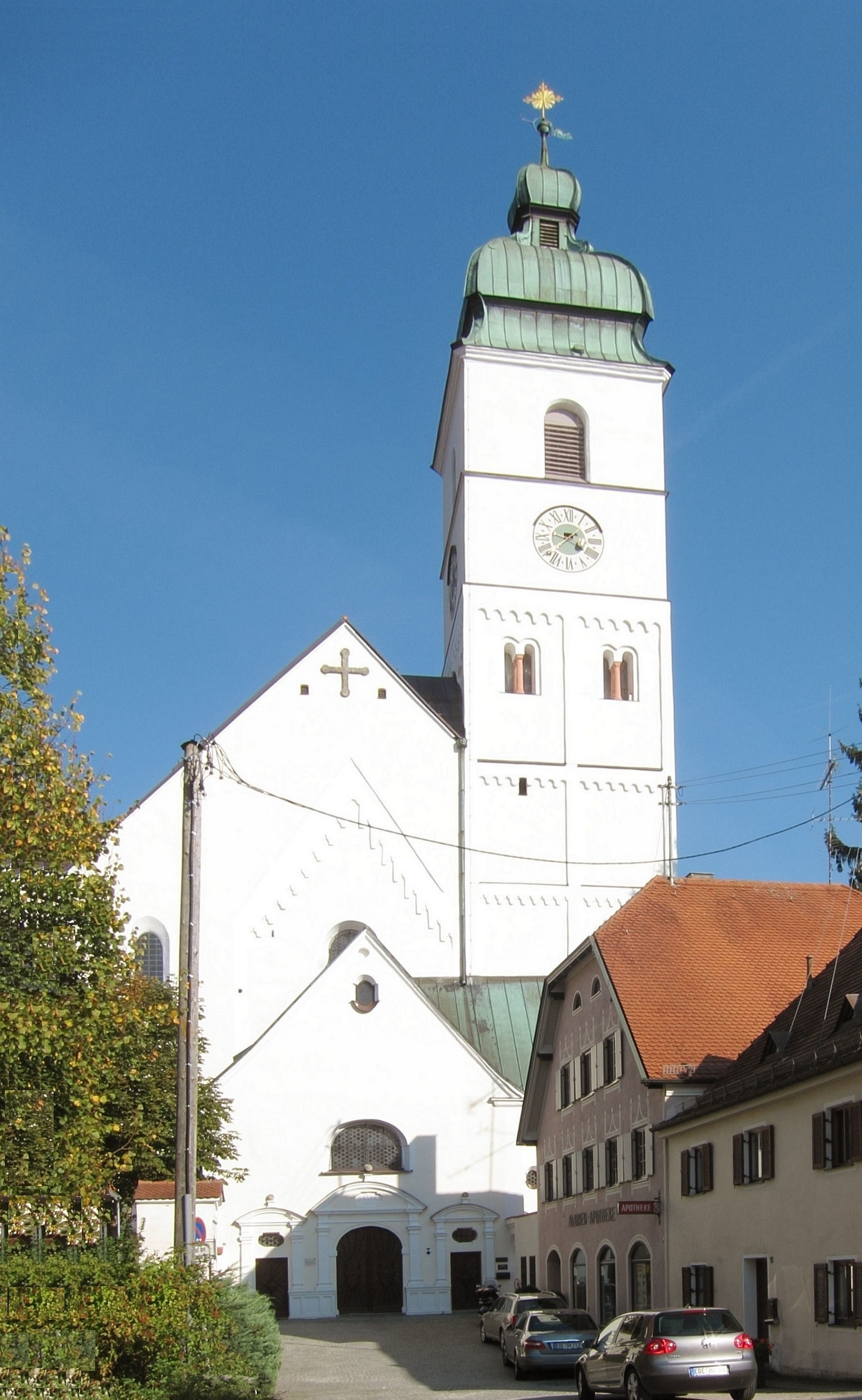 Pfarrkirche St. Sebastian, ehem. Klosterkirche, dreischiffige Halle 1481/84 durch Ulrich Randeck erbaut, Chor 1450/52, barocker Umbau 1733/34, erneuert 1785, Sebastianskapelle 1671, Turm um 1230; mit Ausstattung (D-1-75-115-10)